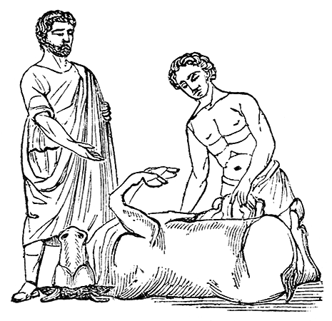 picture